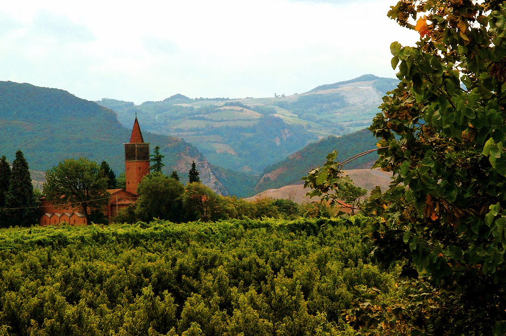 Casalfiumanese, Emilia Romagna, Italy.Casalfiumanese